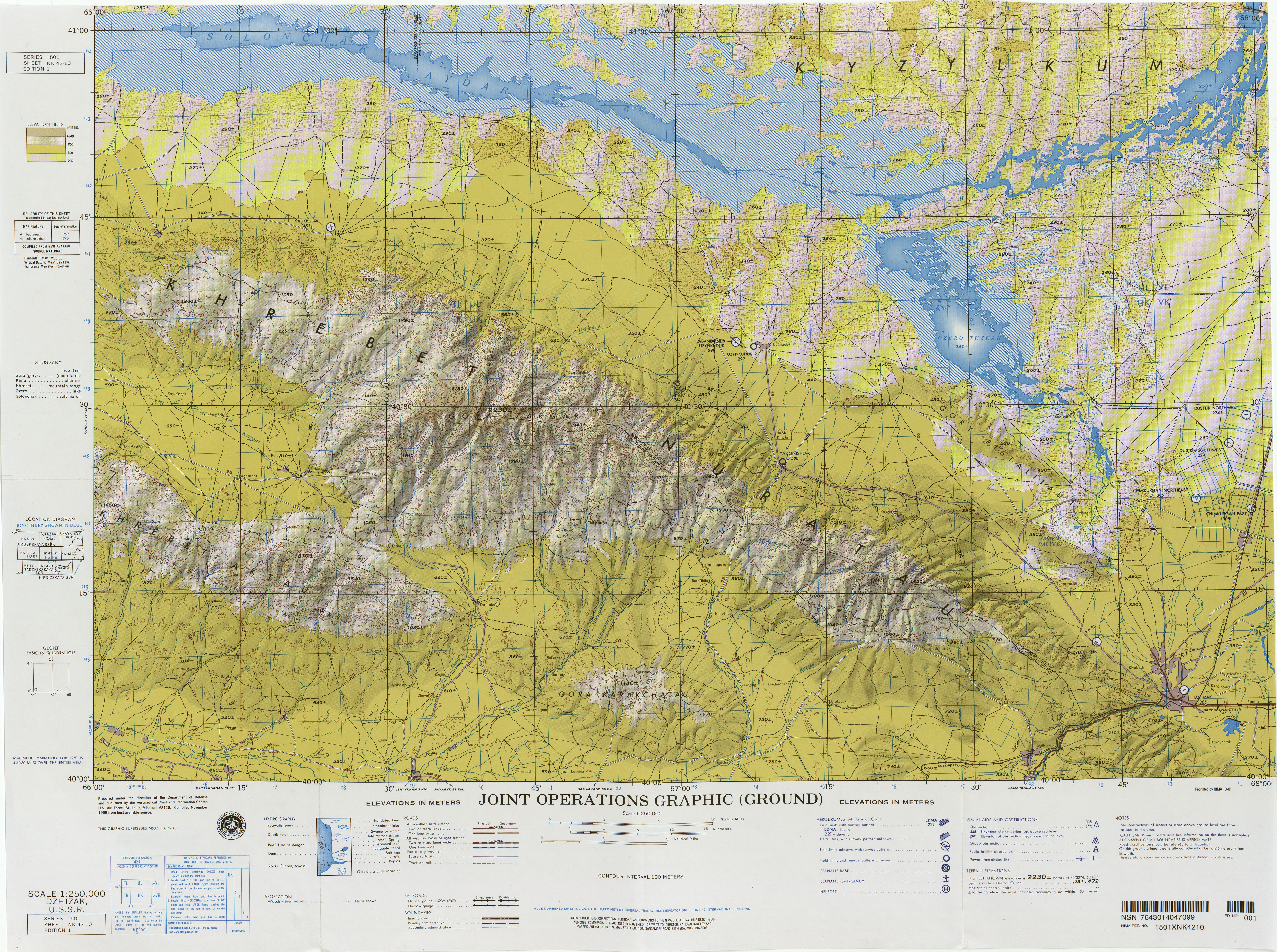 US-Militärkarte des Gebiets des Sees Aydarkol von 1969